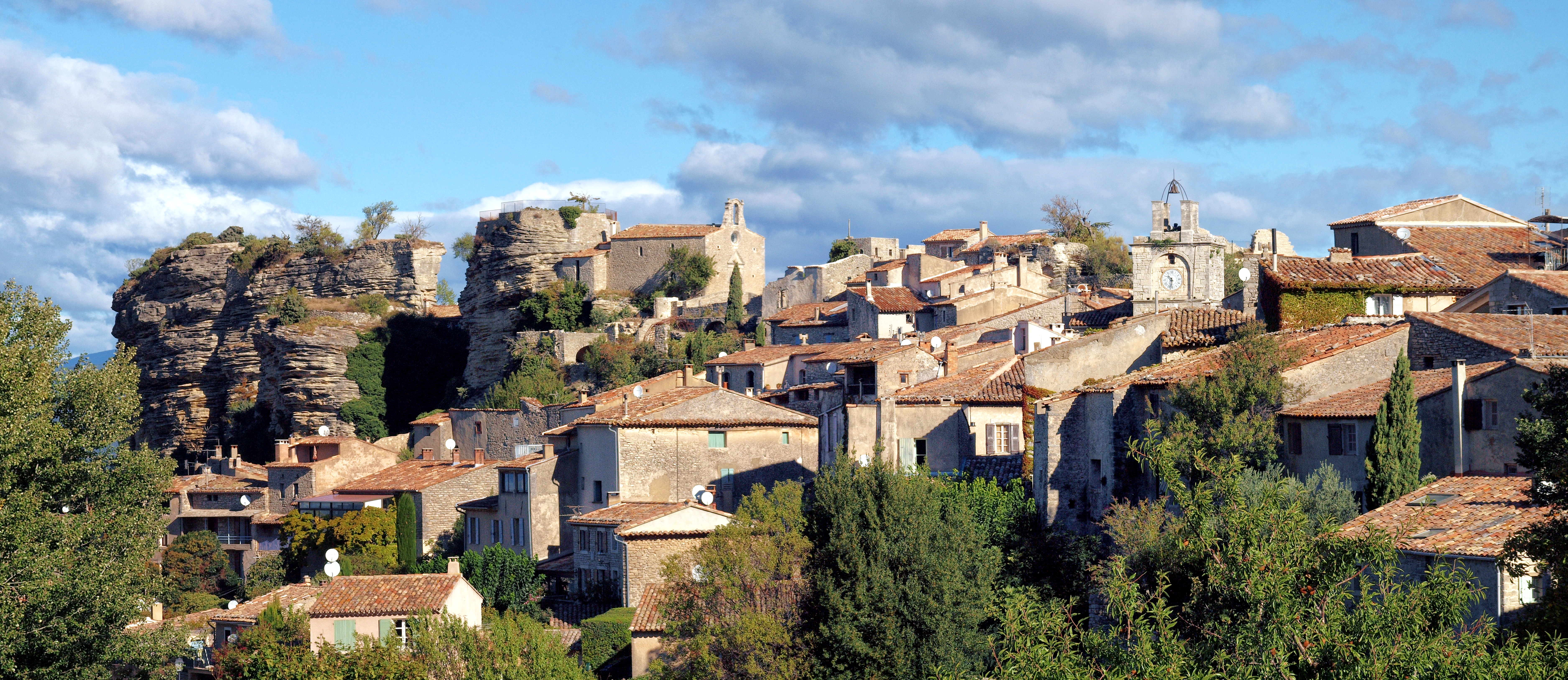 Saignon, Luberon (Provence) - Panorama du village